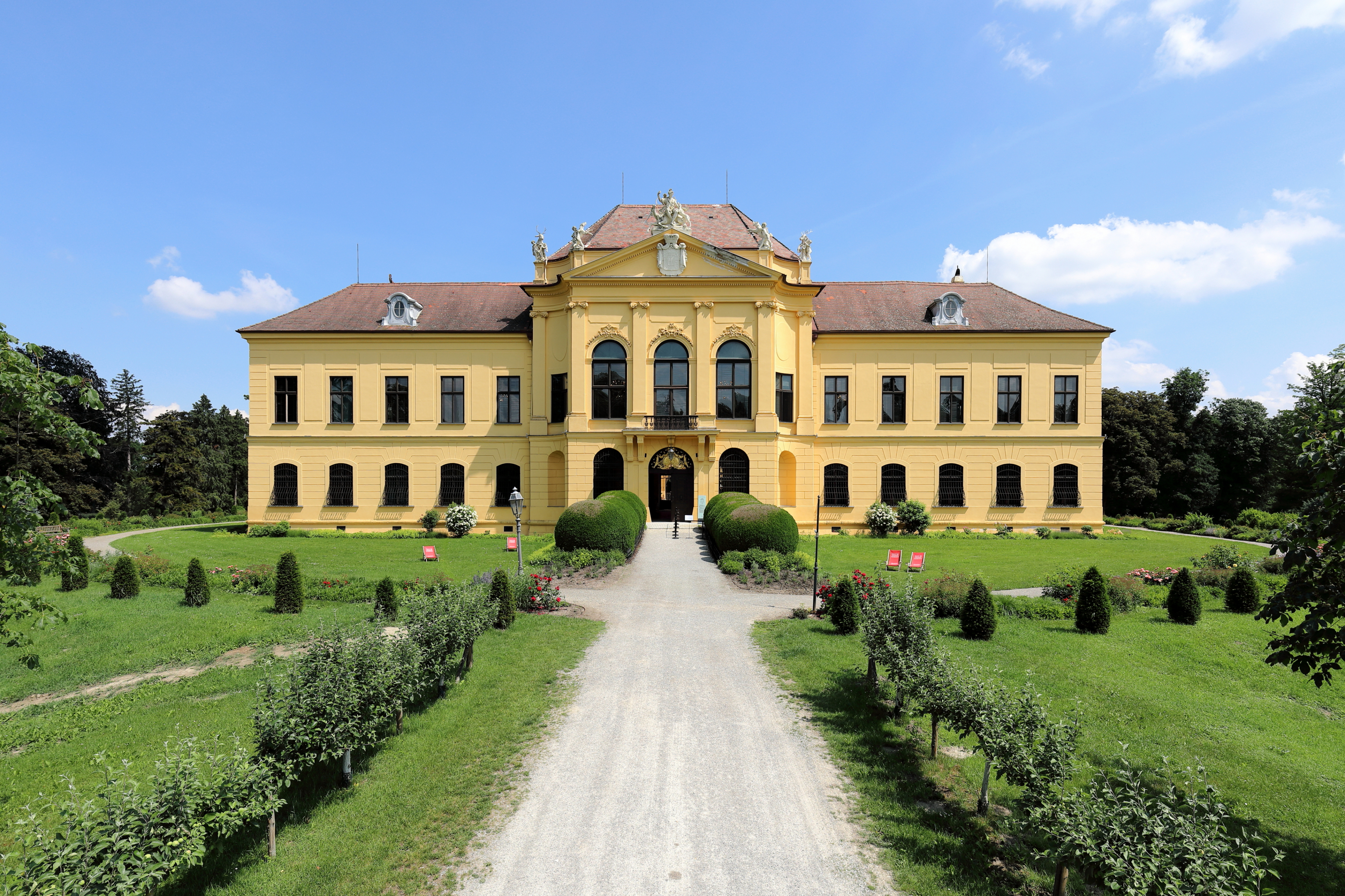 Südwestansicht des Schlosses Eckartsau in der niederösterreichischen Marktgemeinde Eckartsau.Ursprünglich war das vierflügelige Jagdschloss eine mittelalterliche Wasserburg. Von 1722 bis 1732 erfolgte ein Umbau der Anlage; unter anderem wurde dabei der Westtrakt neu errichtet. Nach Überschwemmungen Ende das 18. Jahrhundert wurde wegen Setzungen des Baus der Ostflügel zur Gänze abgetragen und der Südflügel teilweise. 1897/98 fand ein Wiederaufbau statt und dabei erhielt das Schloss im Wesentlichen sein heutiges Aussehen.